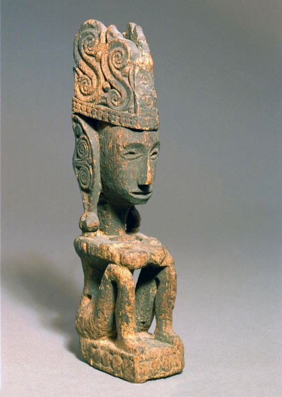 Beeld. Er zijn drie typen beelden te onderscheiden op Leti: voorouderbeelden, beelden van stamouders, die verbonden waren met de oorsprong en stichting van de afstammingsgroepen, en beelden van hemel en aarde voorgesteld respectievelijk als man en vrouw. Onderhavig beeld is een voorouder. Men is er van overtuigd dat iemands "schaduwbeeld" na de dood voortbestaat. Aangenomen wordt dat deze na het overlijden nog enkele dagen rondzwerft in de woonplaats en vervolgens vertrekt naar een dodendorp, gesitueerd op een onbewoond eiland, een rif of een kaap, niet ver van de wereld der levenden. Het beeld stelt de nabestaanden in staat in contact te treden met de overledene. Gewoonlijk offerde men sirih, pinang en palmwijn. Tijdens de offerande was de schaduw van de overledene tijdelijk in het beeld aanwezig. De beelden stonden meestal opgesteld op de huiszolder. De schaduwen werden geacht de huiszolder te bereiken via openingen in de gevel, soms via een speciaal aangebracht luikje.. Houten voorouderbeeld Unknown language: yene iene